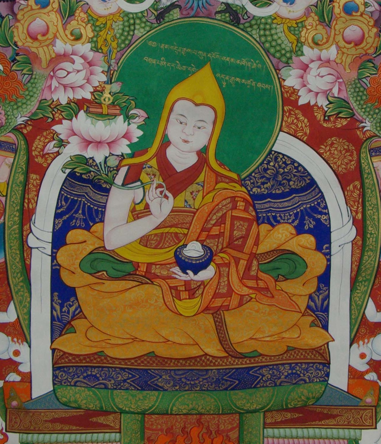 The First Kirti, Gendun Gyeltsen b.1374 - d.1450